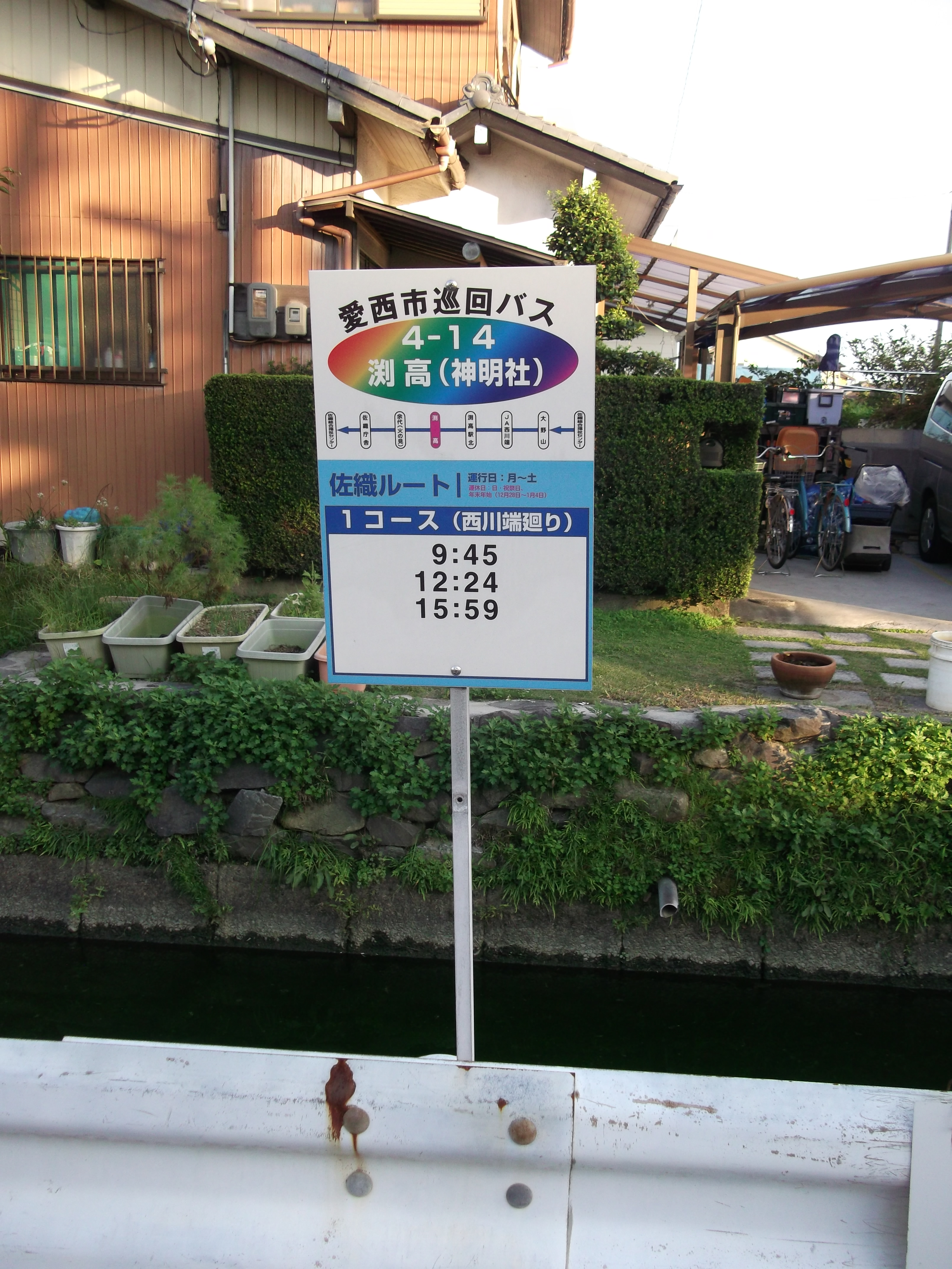 愛西市巡回バス「渕高（神明社）」停留所